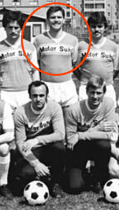 Title: Mannschaftsfoto BSG Motor Suhl Factual corrections and alternative descriptions are encouraged separately from the original description. Additionally errors can be reported at this page to inform the Bundesarchiv. Original historic description: ADN-ZB Schaar 16.6.84 Suhl: Aufsteiger zur Fußball-Oberliga 1984-85: BSG Motor Suhl. Einen Spieltag vor Abschluß der Aufstiegsrunde sicherte sich die BSG Motor Suhl einen der beiden freien Plätze in der Fußball-Oberliga. Die Thüringer spielen damit in der nächsten Serie erstmals in der höchsten DDR-Fußballklasse. Hintere Reihe v.l.n.r.: Trainer Paul Kersten, Wolfgang Reuter, Peter Staps, Hartmut Weiß, Andreas Böhm, Roman Seyfarth, Andreas Schneider, Dieter Kurth, Klaus Schröder, Matthias Brückner, Erhard Mosert, Gerd Schellhase, Mannschaftsleiter Frank Hoffmann und Trainer Ernst Kurth. Vordere Reihe v.l.n.r.: Masseur Peter Eichelbrenner, Klaus Semineth, Dieter Erhardt, Jürgen Schneider, Torhüter Walter Jänicke, Torhüter Klaus Müller, Ralf Eismann, Uwe Jertschewski, Uwe Trömel und Trainer Burkhardt Winkler.